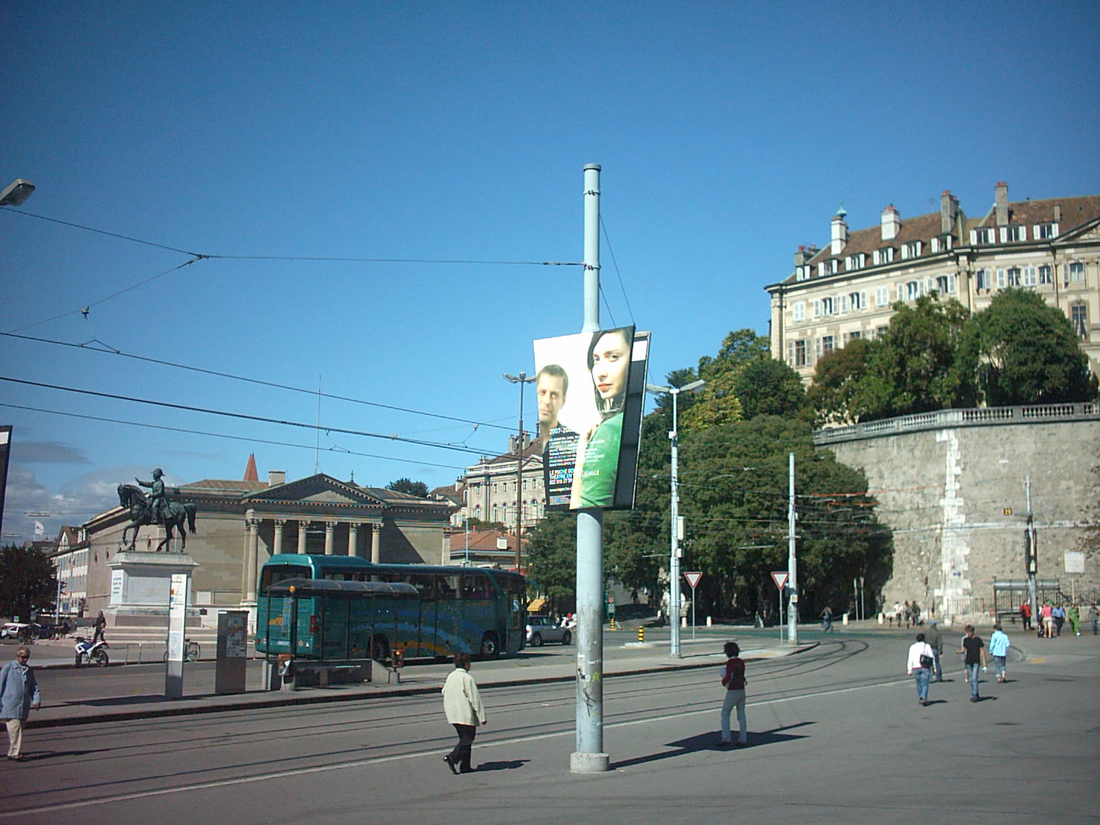 Place Neuve à Genève (Suisse)